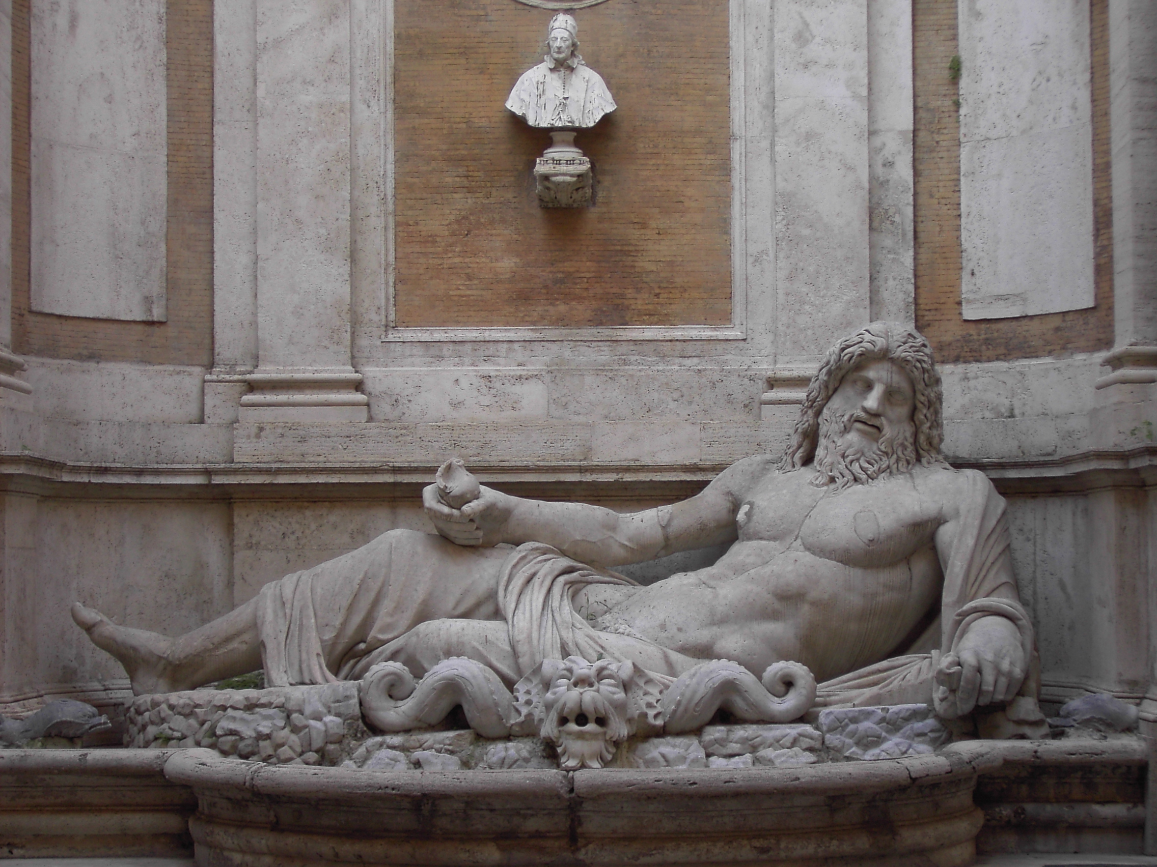 Roma, le statue parlanti: Marforio (al Campidoglio, ingresso dei Musei Capitolini al Palazzo Nuovo)